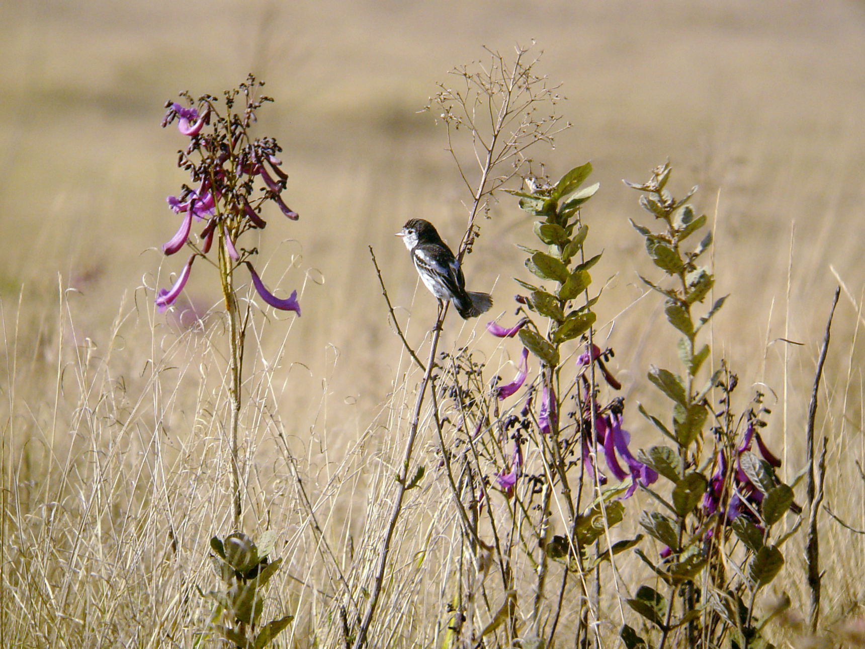 Canastra, Brazil, August 2006